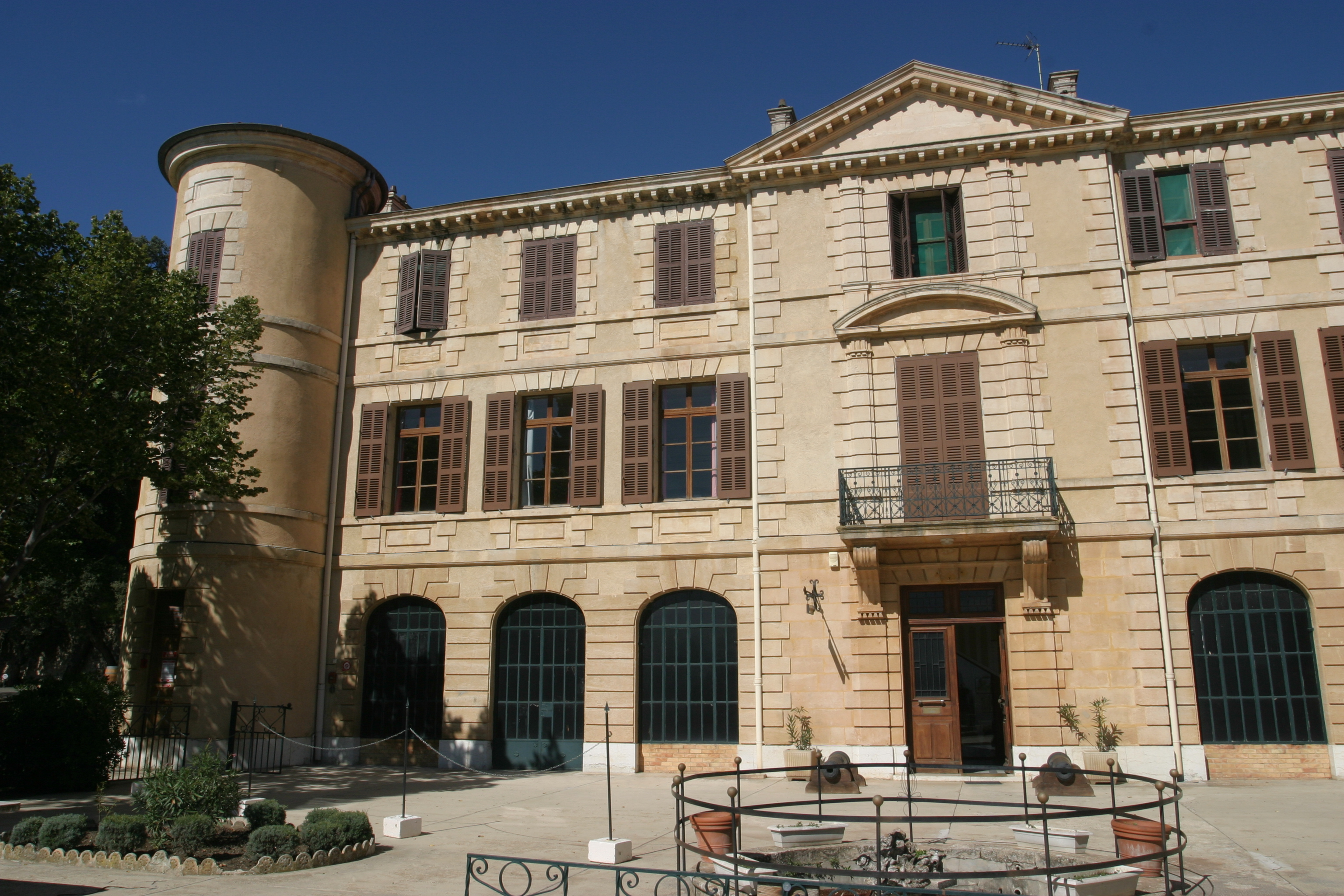 Institut des Invalides de la Légion étrangère